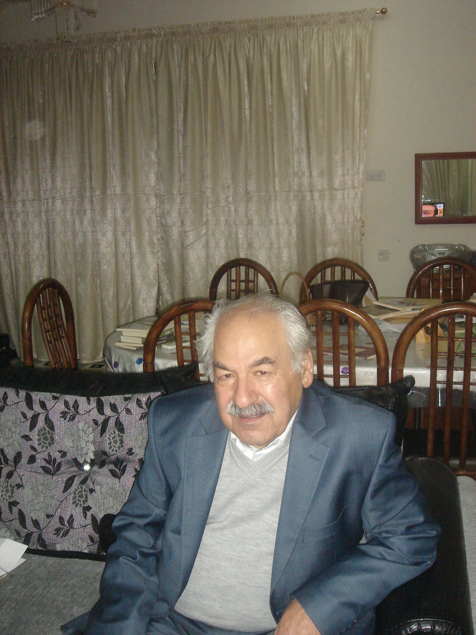 صورة السياسي الكردي فلك الدين كاكئي